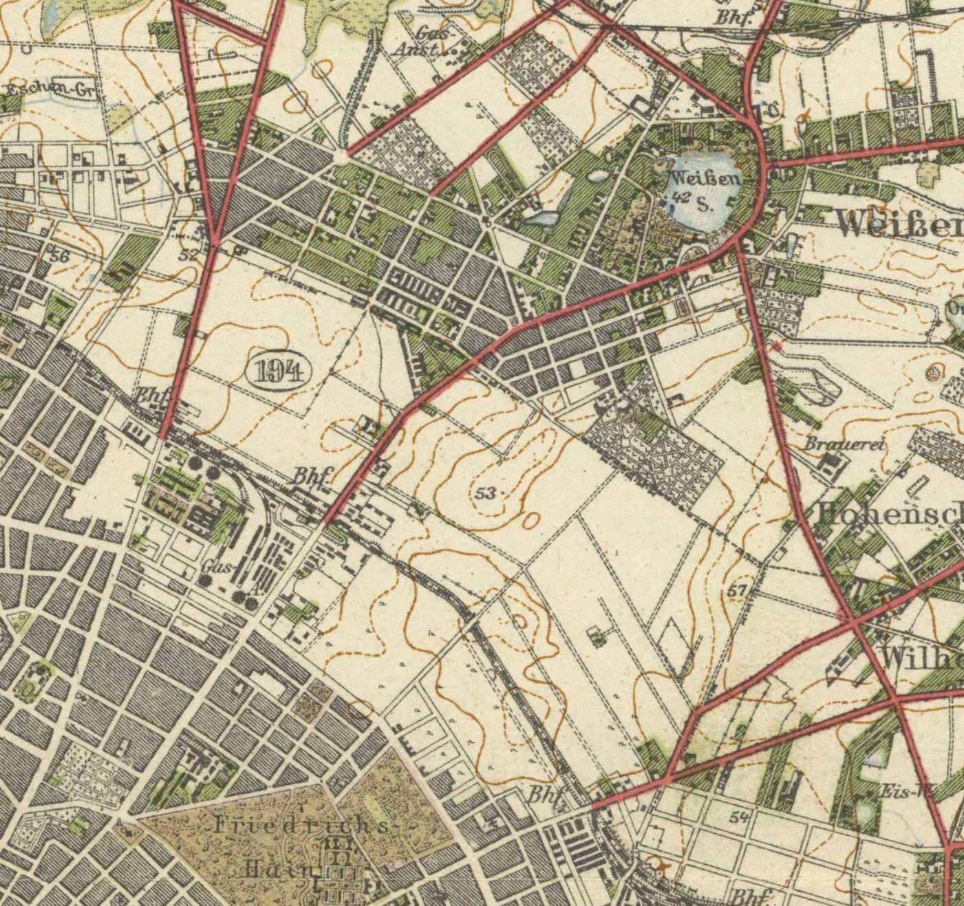 Die aus 12 Blättern bestehende Kartenserie ging 1901 aus der "Karte der Umgegend von Berlin" hervor und erschien bis 1920 mindestens fünfmal. Der Titel steht auf allen Blättern 2-zeilig links oben über dem Plan. Links unter dem Plan steht: "Preußische Landesaufnahme 1901. Herausgegeben 1904." Dahinter der Vermerk "Berichtigt 1913." (bzw. 1912); drei Maßstabsleisten über 8.000 Meter, 10.000 Schritt und 1 geographische Meile; rechts daneben ein Übersichtsschema und ein Hinweis zum Höhenbezug. Rechts und Links neben dem Plan ist auf jedem Blatt eine ausführliche Legende abgedruckt.